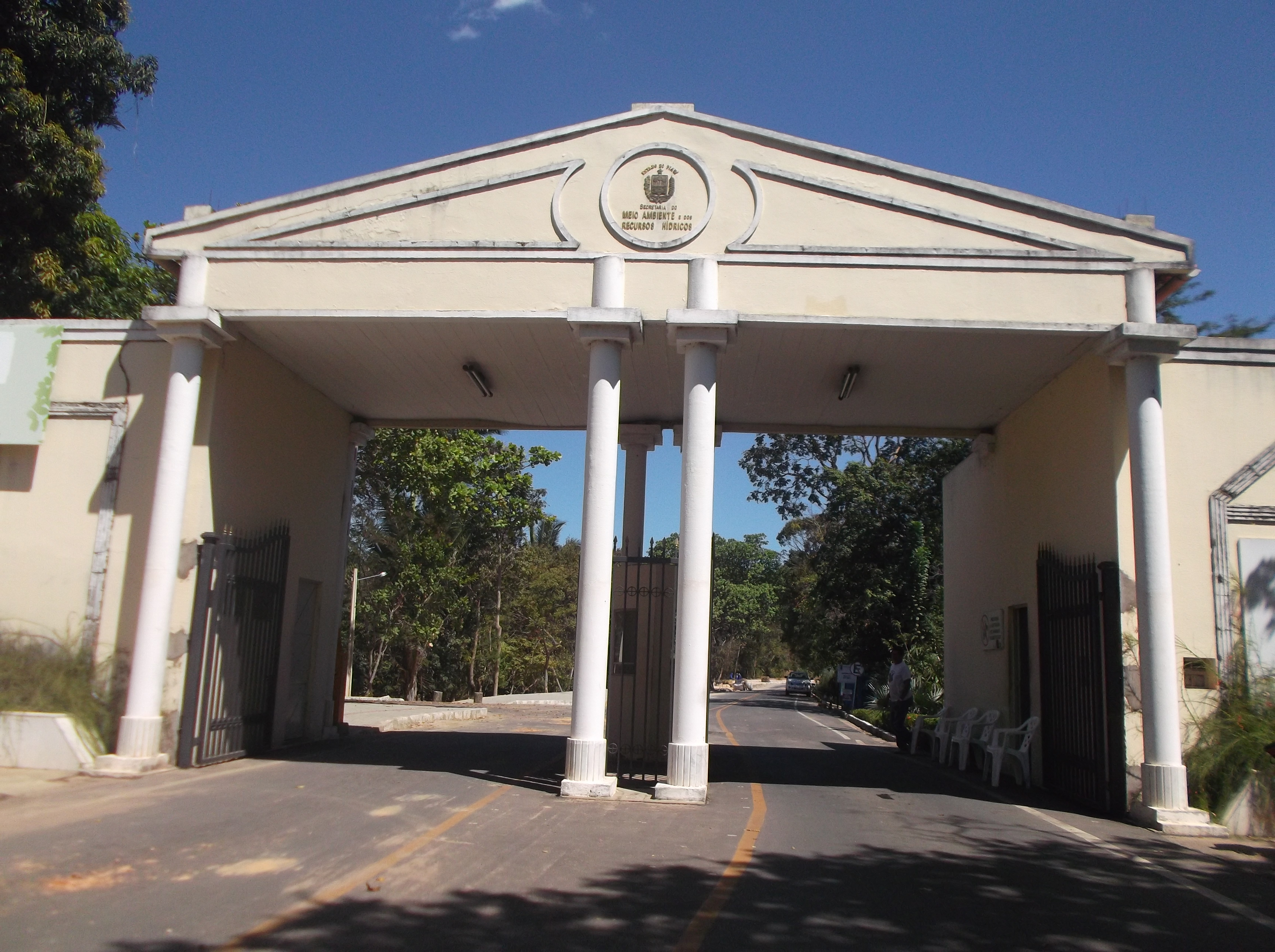 Pórtico palacial de entrada do Parque Zoobotânico de Teresina.